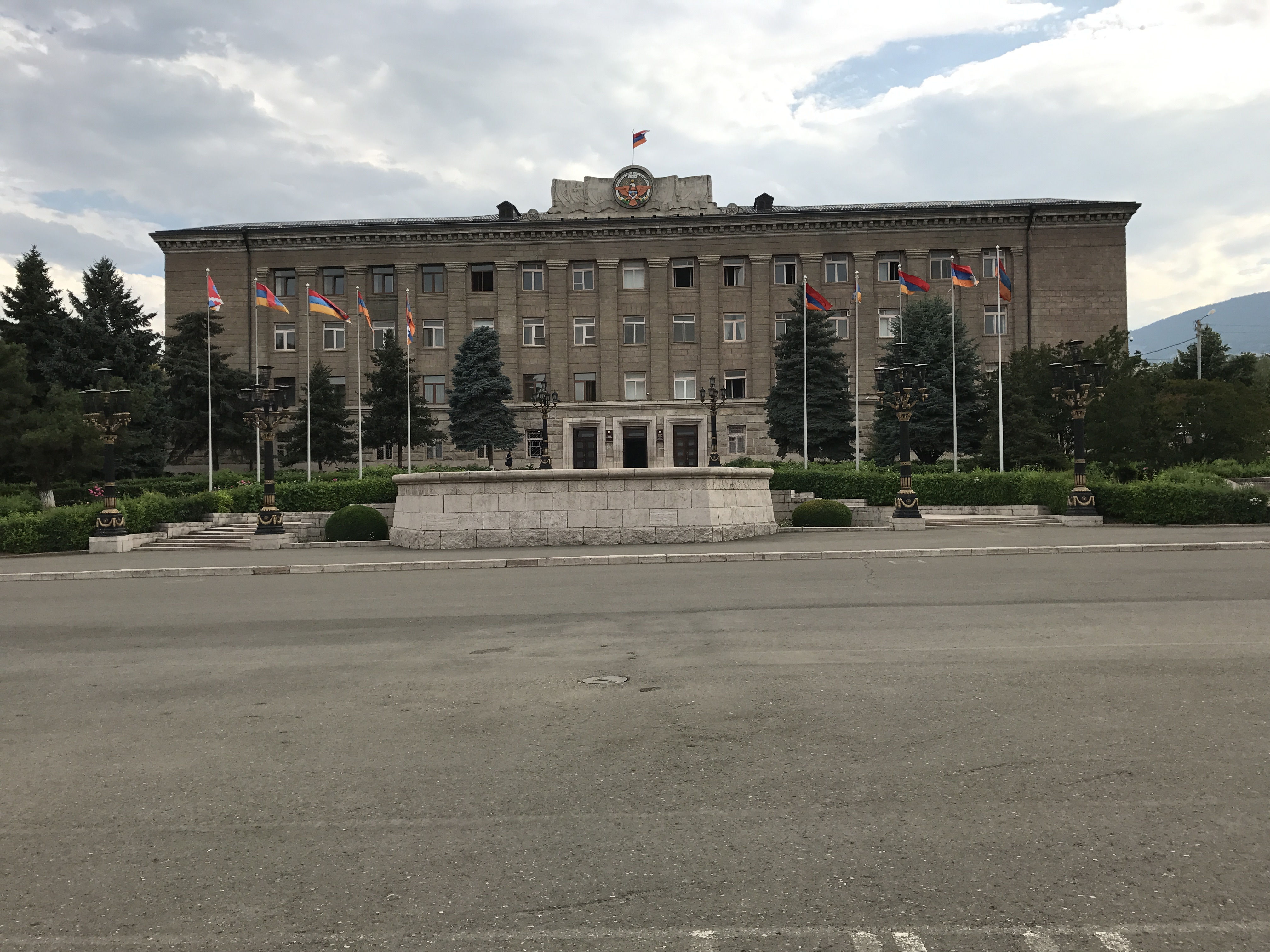 Image de Stepanakert (Artsakh) en 2017.